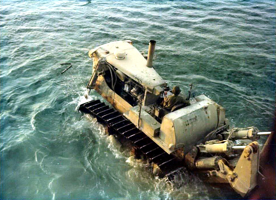 קטרפילר נוחת בדרכו לדחיפת הספינה ללא הכף